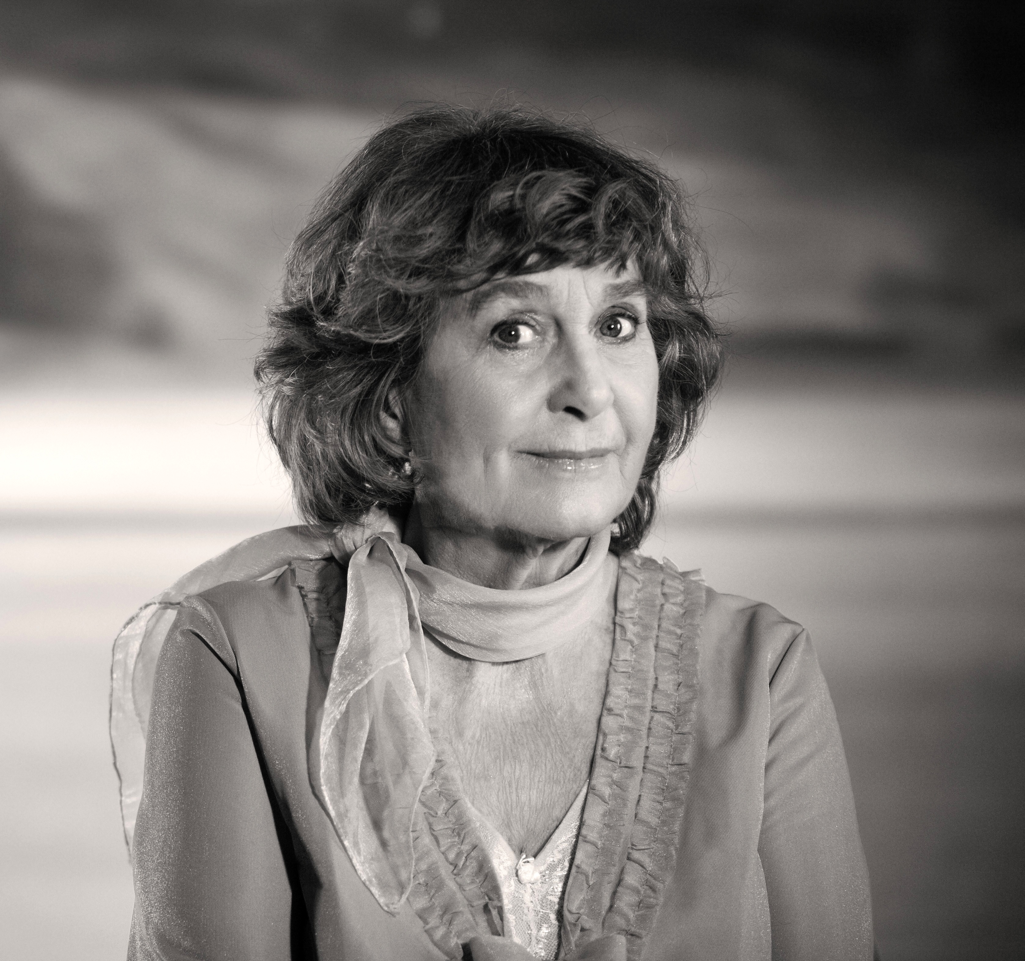 Siw Malmkvist i "Bättre sömn åt alla" IKEA sängkampanj.